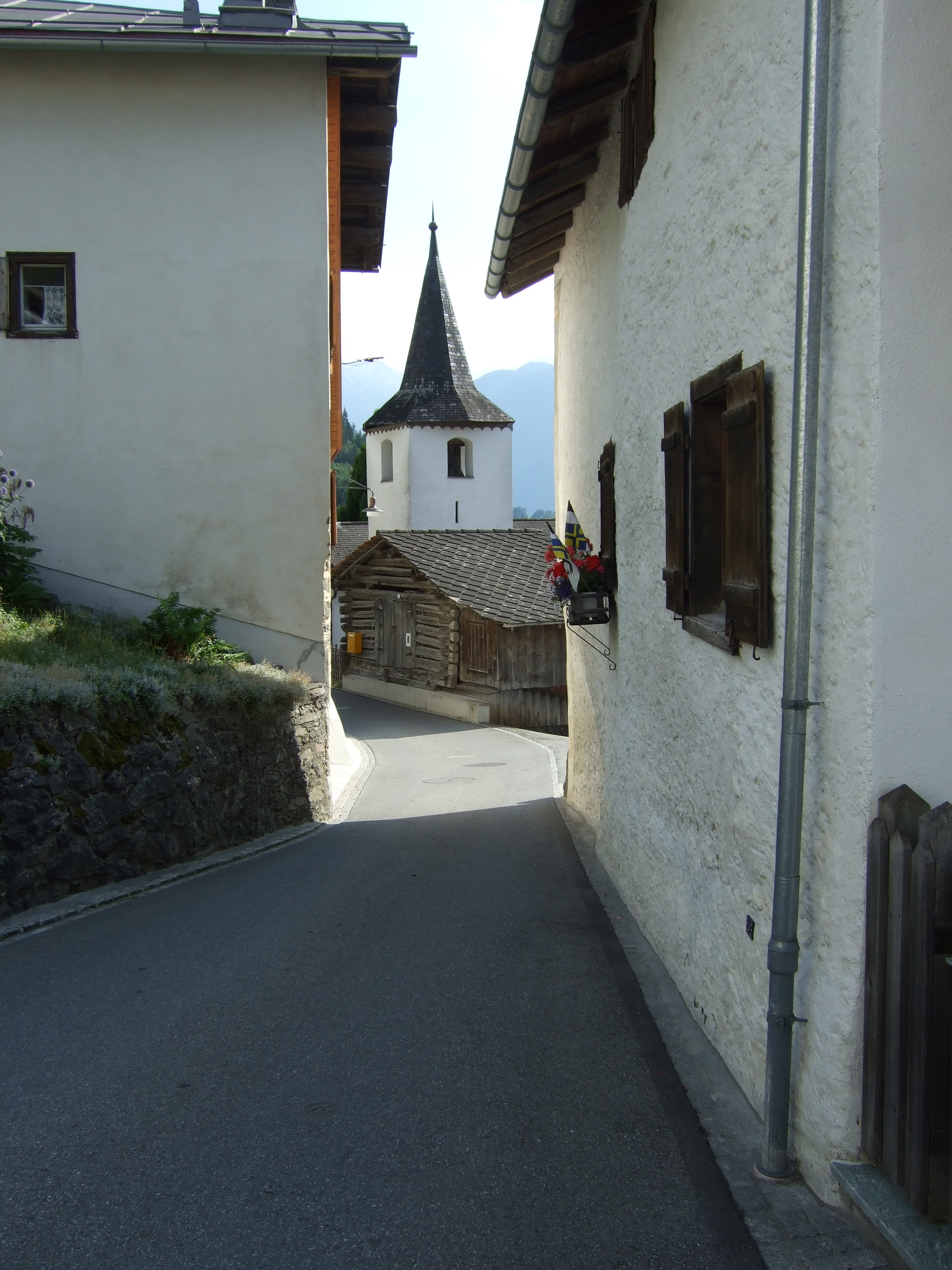 Kirche in Reischen, Zillis-Reischen, Graubünden